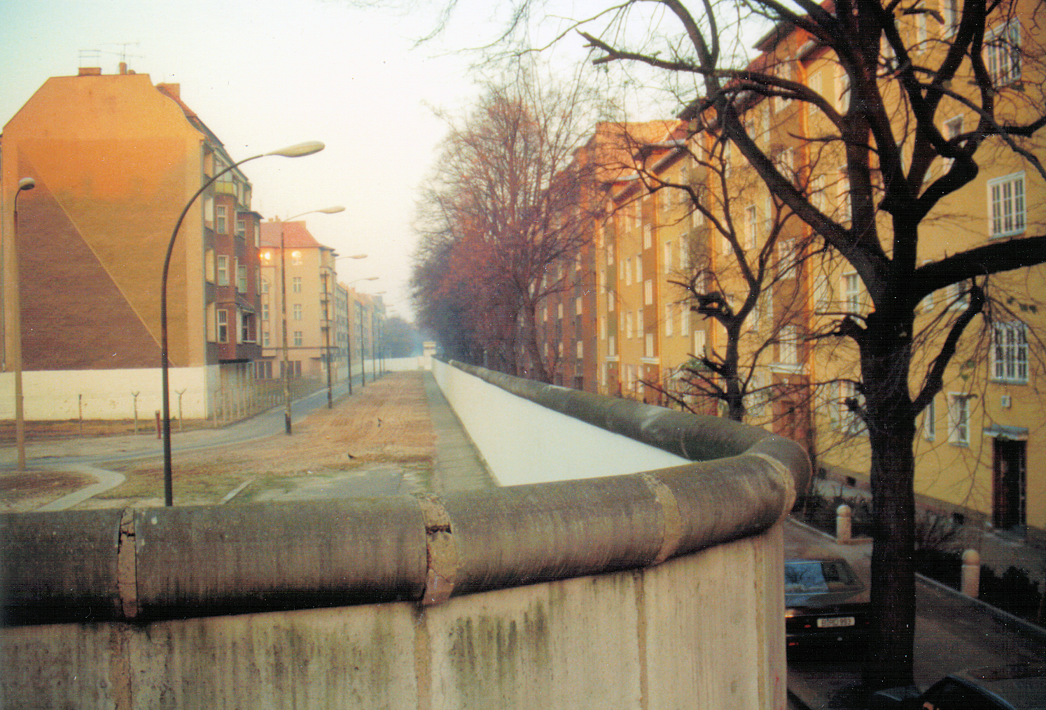 Mauerverlauf Bouchéstraße / Harzer Straße in Berlin. Das Foto diente als Vorlage für eine Computergrafikanimation in der History-XXL-Dokumentation "Flucht in die Freiheit, Teil 2, Mit allen Mitteln". Video bei Youtube (18:57)